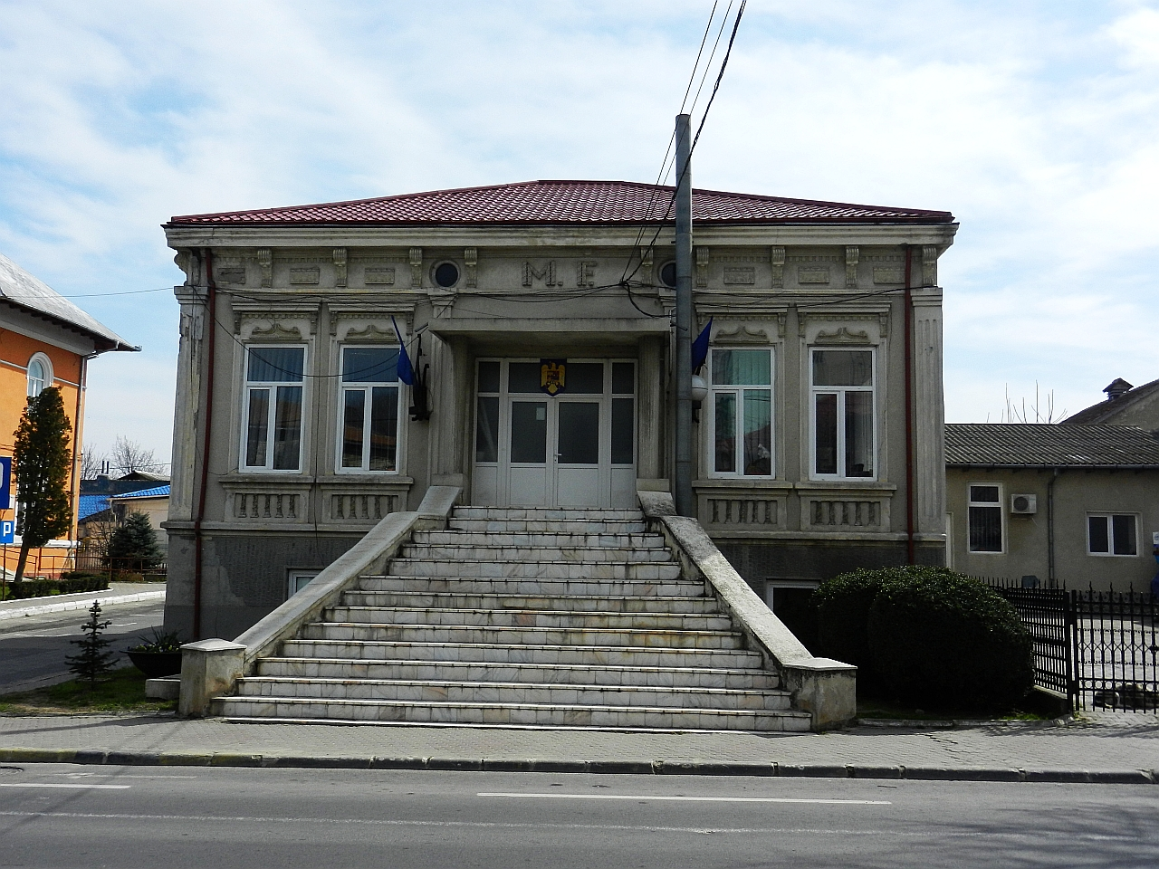 Astazi sediul Agentiei Fiscale